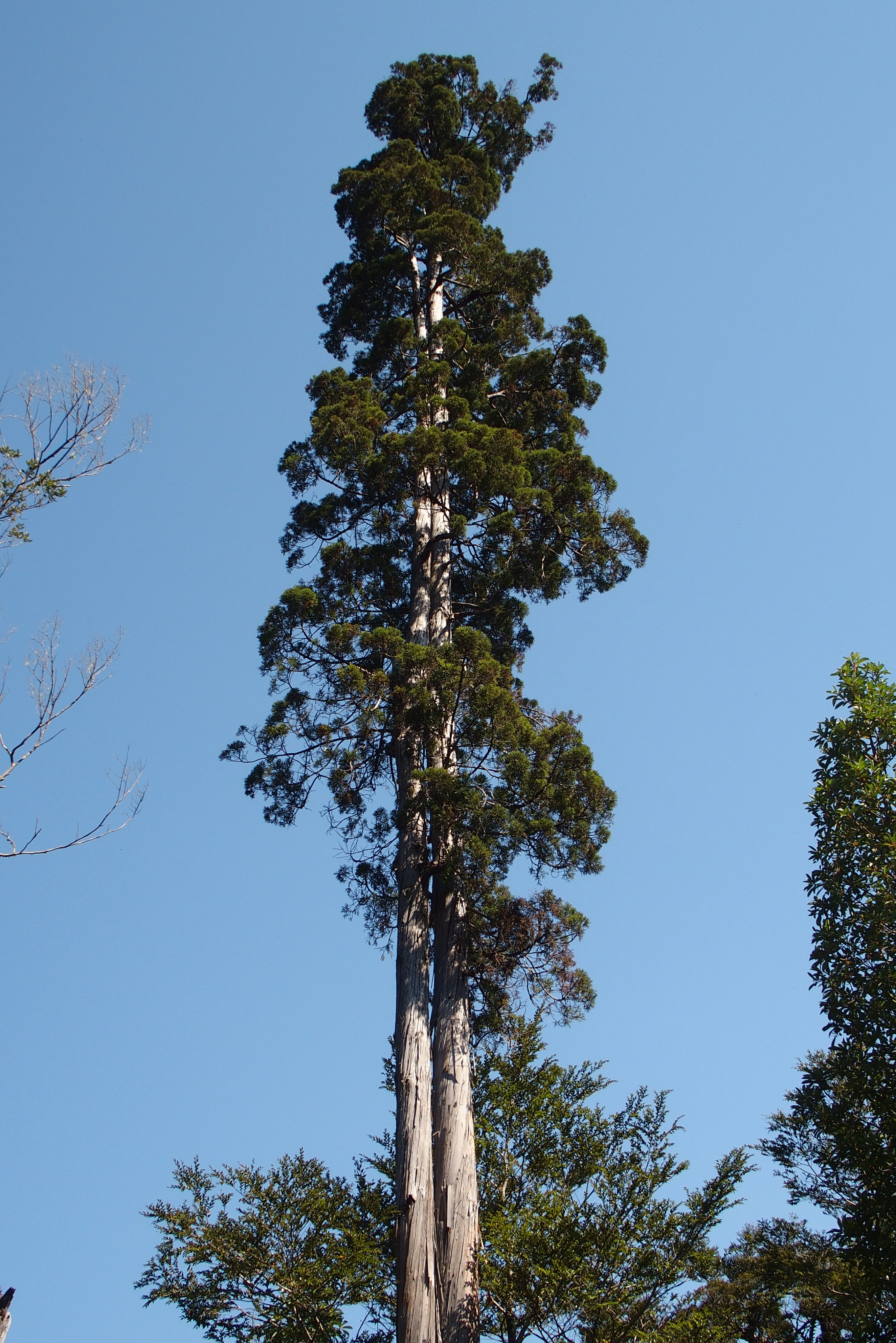 Alerce (Fitzroya cupressoides) im Nationalpark Alerce Andino in Chile